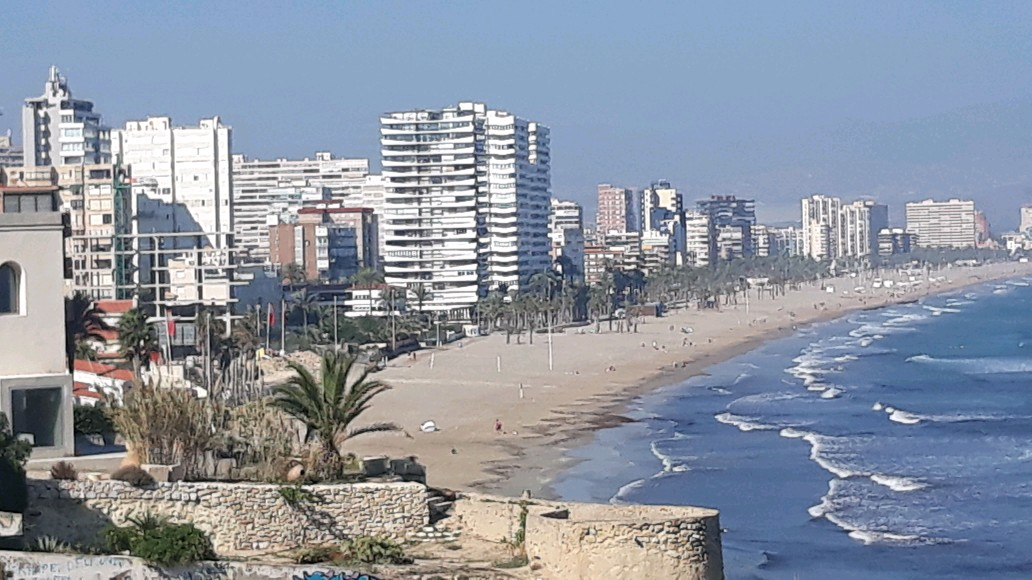 Vista de la Playa de San Juan desde el Cabo de la Huerta, Alicante